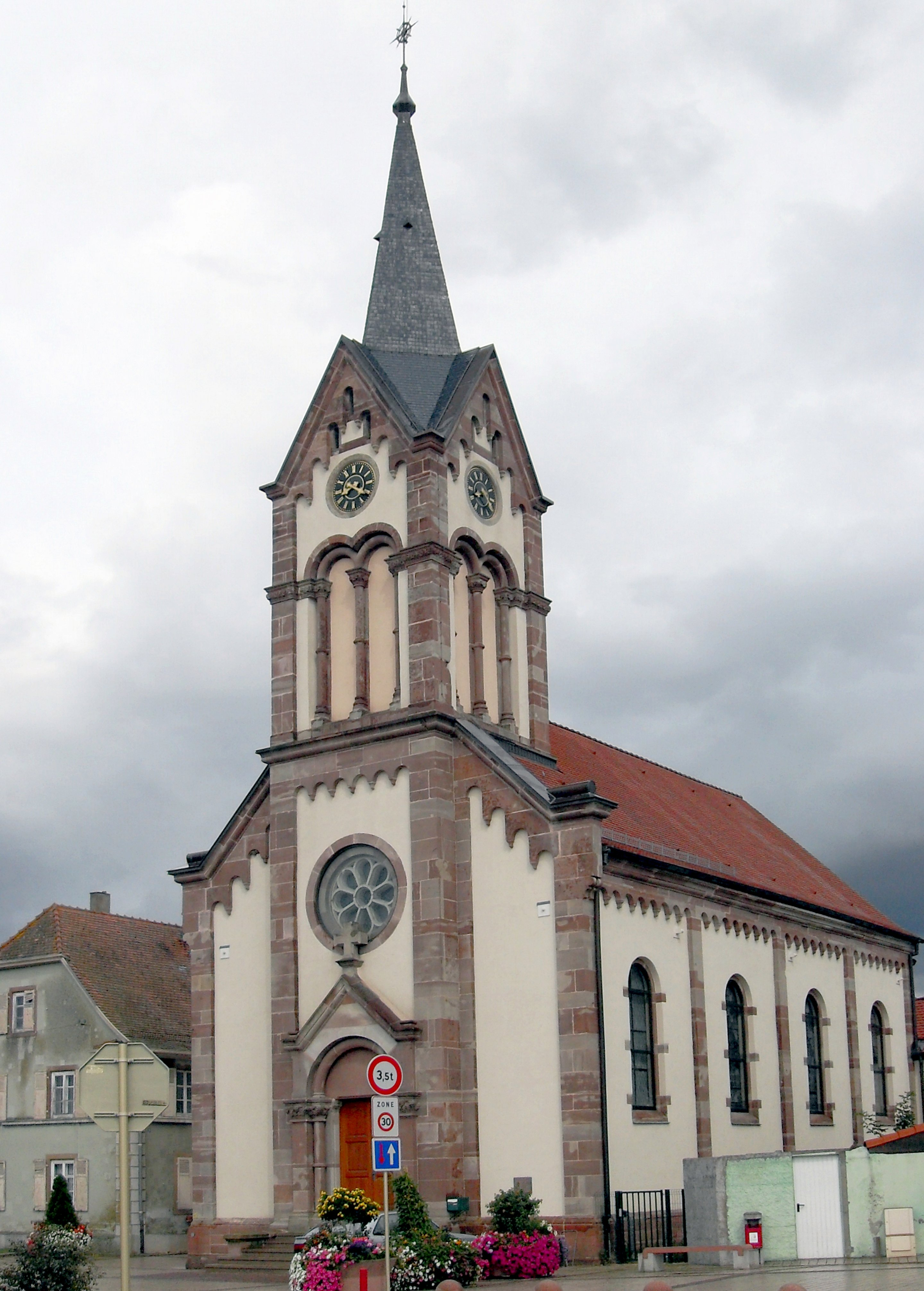 L'église Saint-Étienne à Pulversheim